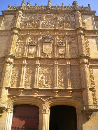 Catedral nueva de Salamanca - España